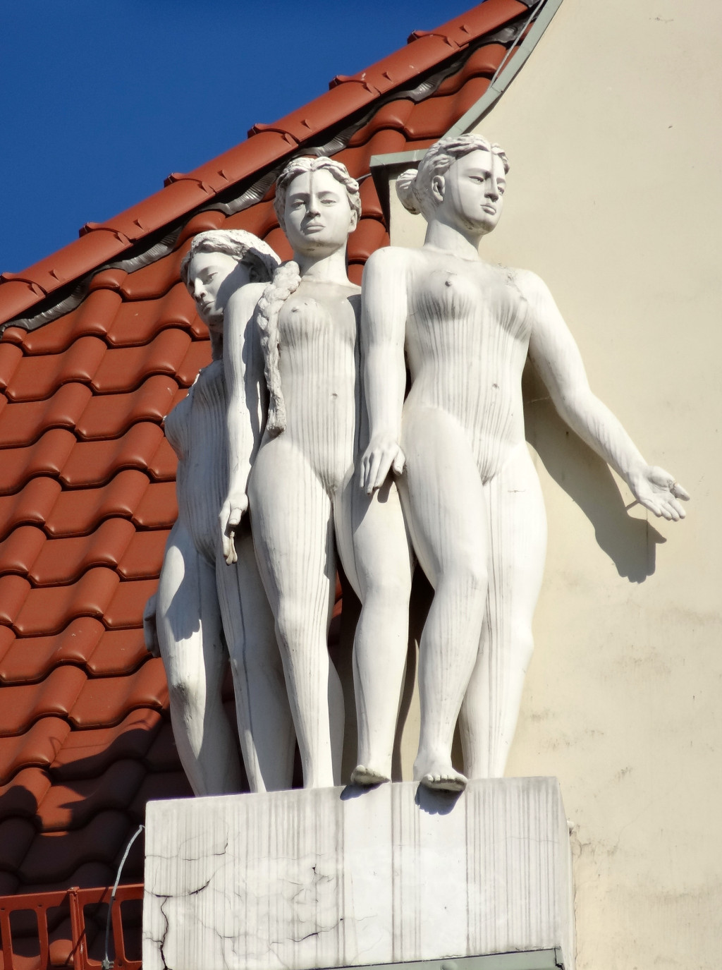 Kamienica przy ul. Gdańskiej w Bydgoszczy